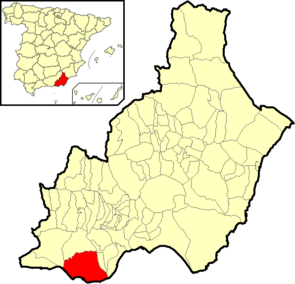 Situación del término municipal de El Ejido respecto a la provincia de Almería, en España.